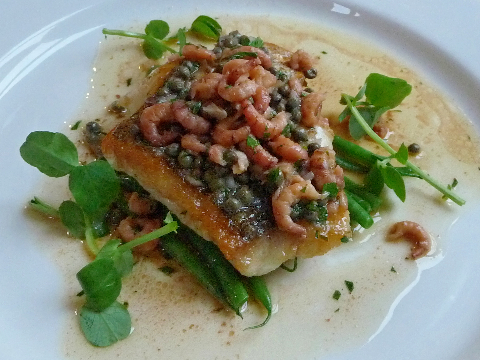 Gegrillter Seebarsch (Europäischer Wolfsbarsch), mit Nordseekrabben und Kapern (zusammen mit gedünsteten Schalottenwürfeln in Butter geschwenkt), auf einem Bett aus grünen Bohnen, mit einer Sauce aus Krabbensud, garniert mit Wasserkresse.Hier im Restaurant The Archangel in Frome in Somerset, England.